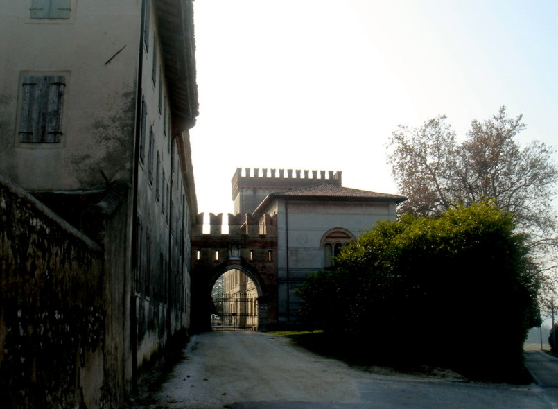 Colle Umberto (Treviso, Italia): Villa-castello Lucheschi, veduta dell'ingresso del complesso.